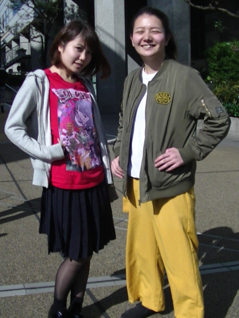 ターリーターキー (2018年3月17日)